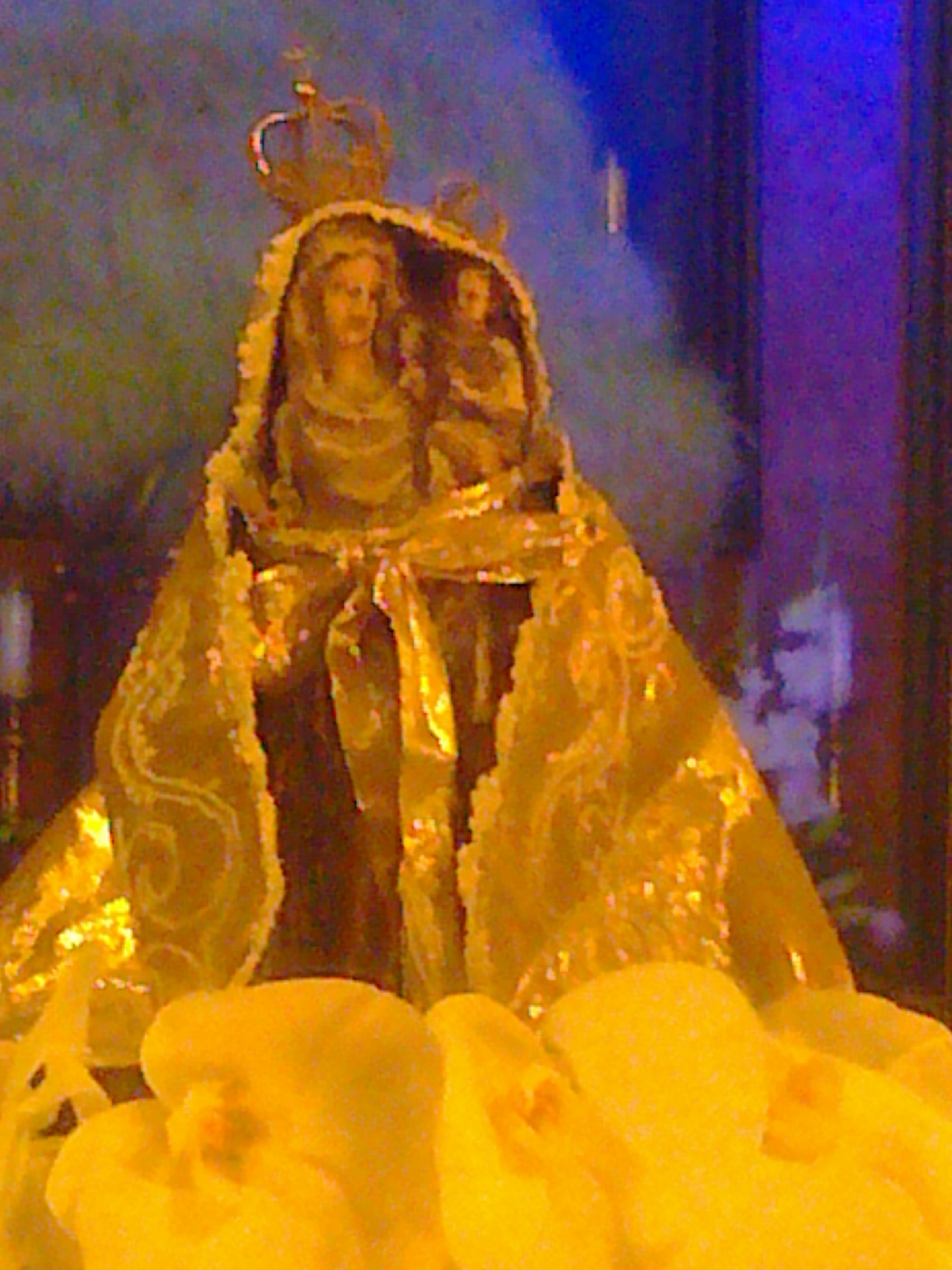 Nossa Senhora do Paraíso